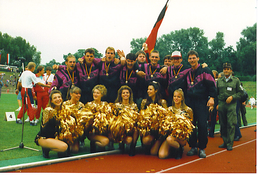 X. Internationale Feuerwehrsportwettkämpfe 1993 in Berlin, Disziplin Löschangriff - Sieger: Mannschaft FF Beselich-Obertiefenbach, selbst fotografiert